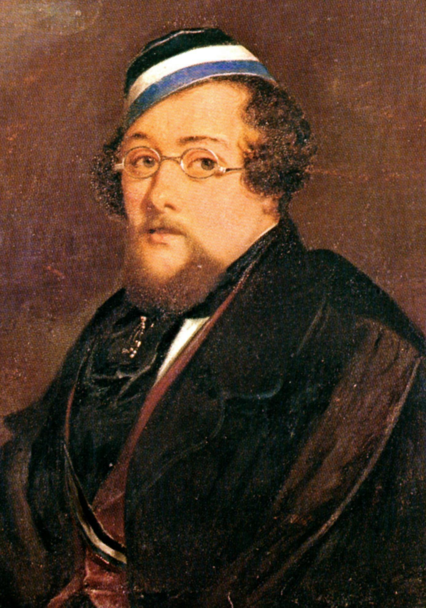 Ölporträt von Wilhelm Kastner